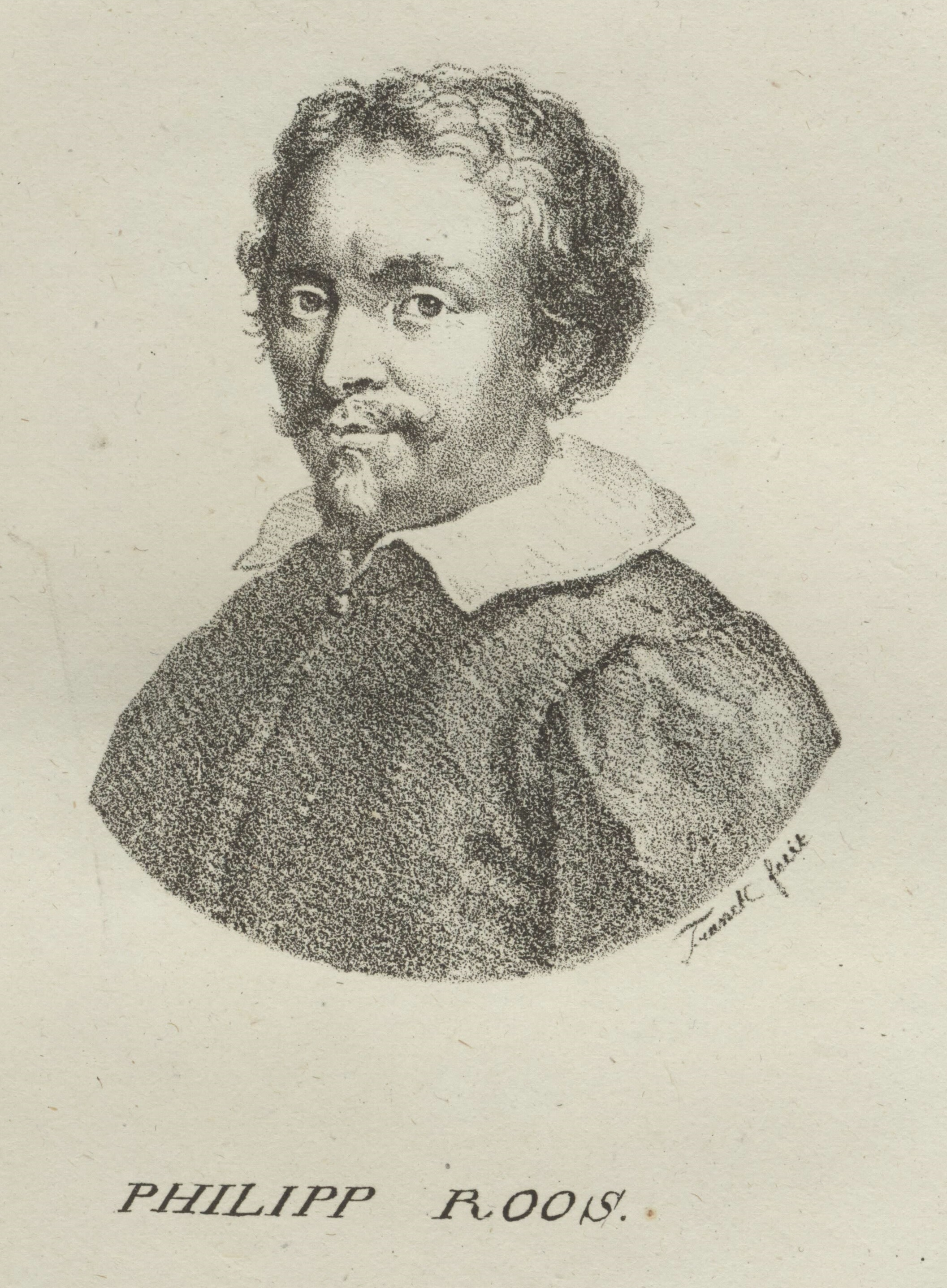 Porträt von Philipp Peter Roos